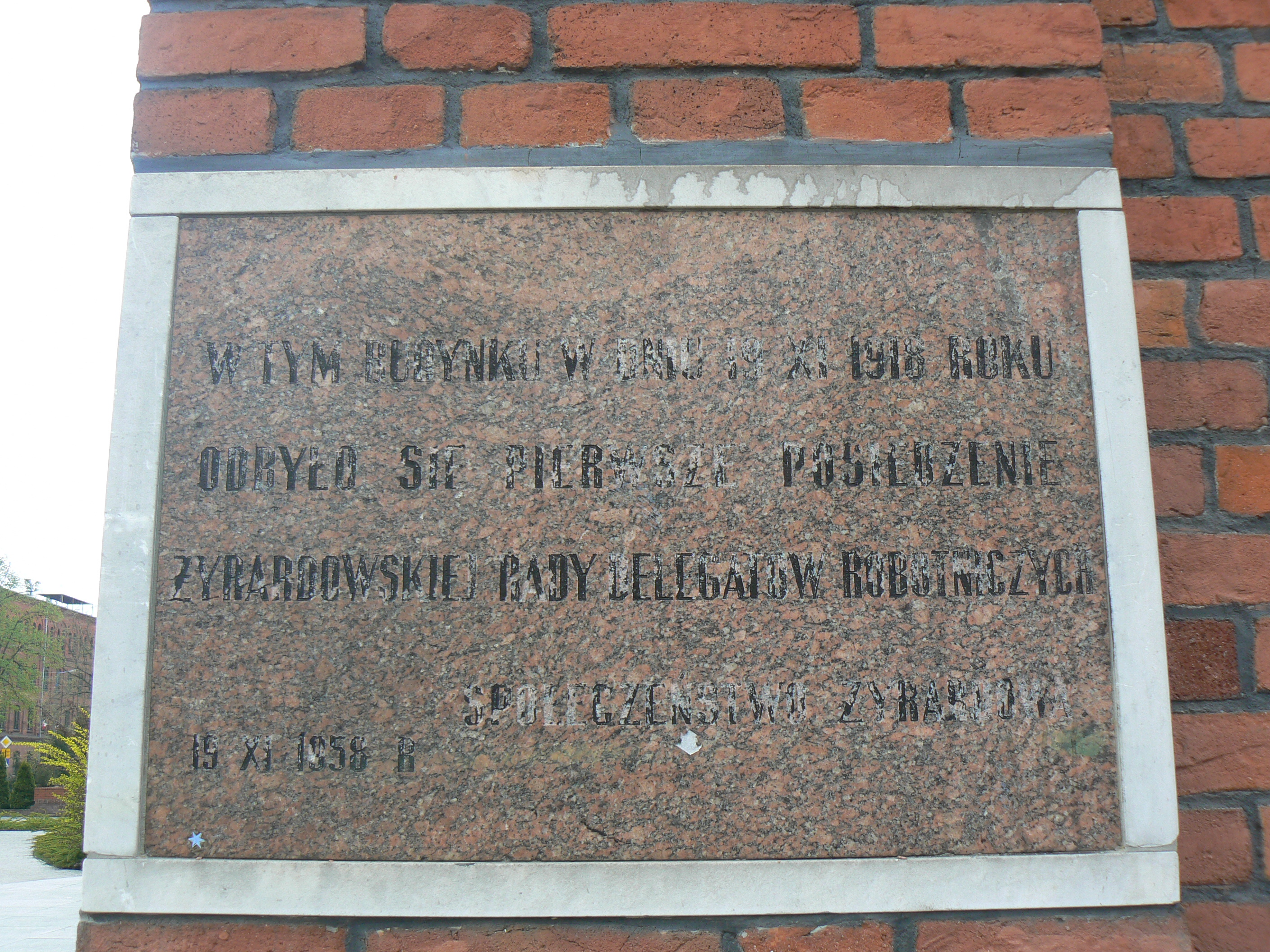 Tablica z 19 listopada 1958 r., upamiętniająca pierwsze posiedzenie Rady Delegatów Robotniczych w Żyrardowie, umieszczona na budynku resursy fabrycznej. Treść tablicy: W TYM BUDYNKI W DNIU 19 XI 1918 ROKU ODBYŁO SIĘ PIERWSZE POSIEDZENIE ŻYRARDOWSKIEJ RADY DELEGATÓW ROBOTNICZYCH SPOŁECZEŃSTWO ŻYRARDOWA 19 XI 1958 R